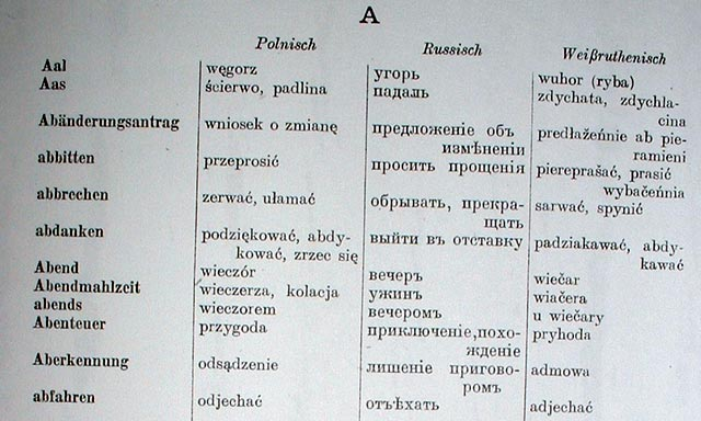 Першая старонка Сямімоўнага слоўніка